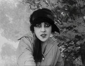 1915 screenshot of actress Musidora in the Louis Feuillade-directed film series Les Vampires